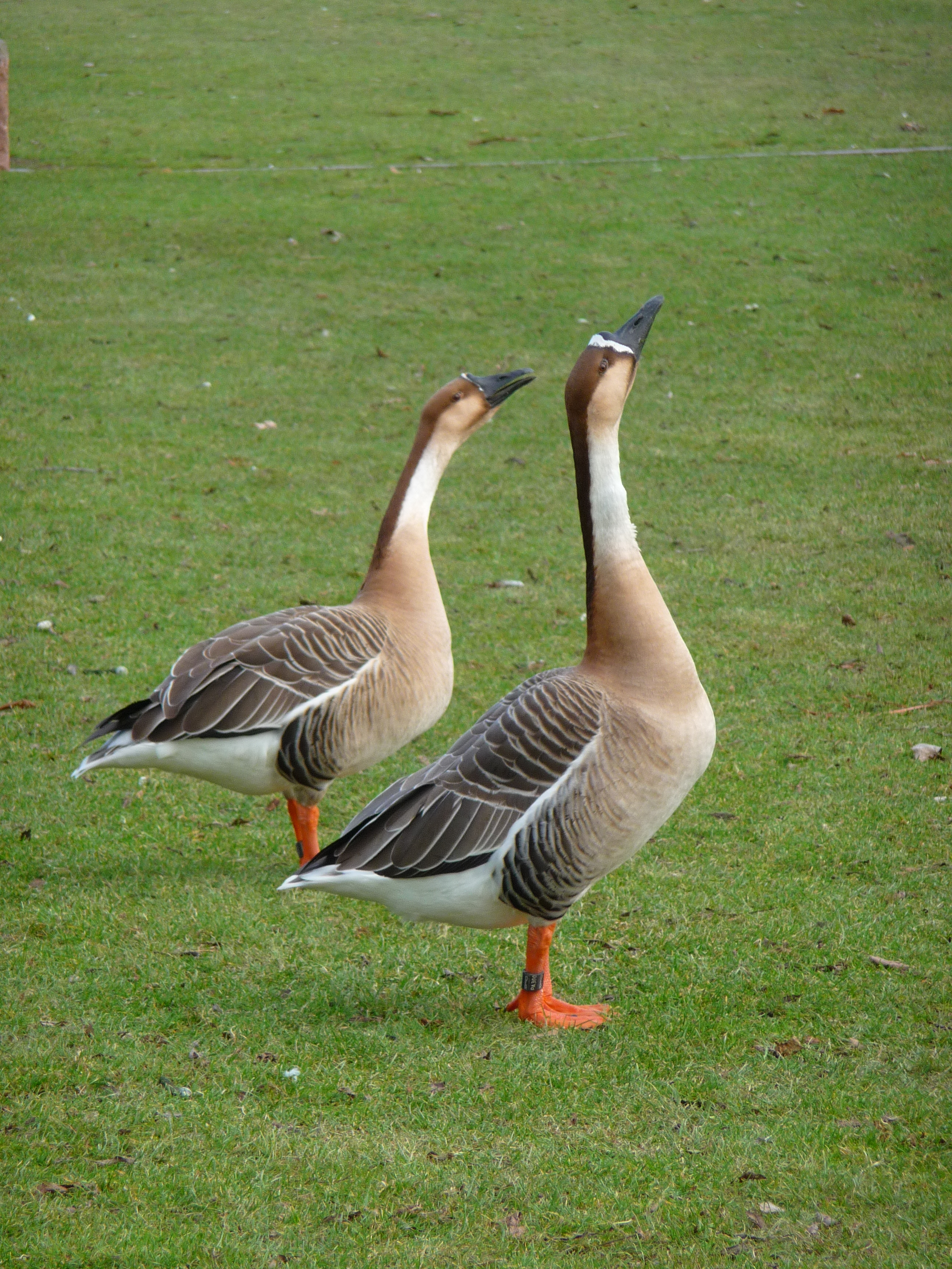 Schwanengänse (Anser cygnoides) am nördlichen Ufer des Neckars in Heidelberg (Baden-Württemberg, Deutschland)